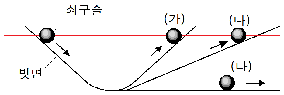 갈길레이의 관성 도출 실험 개도